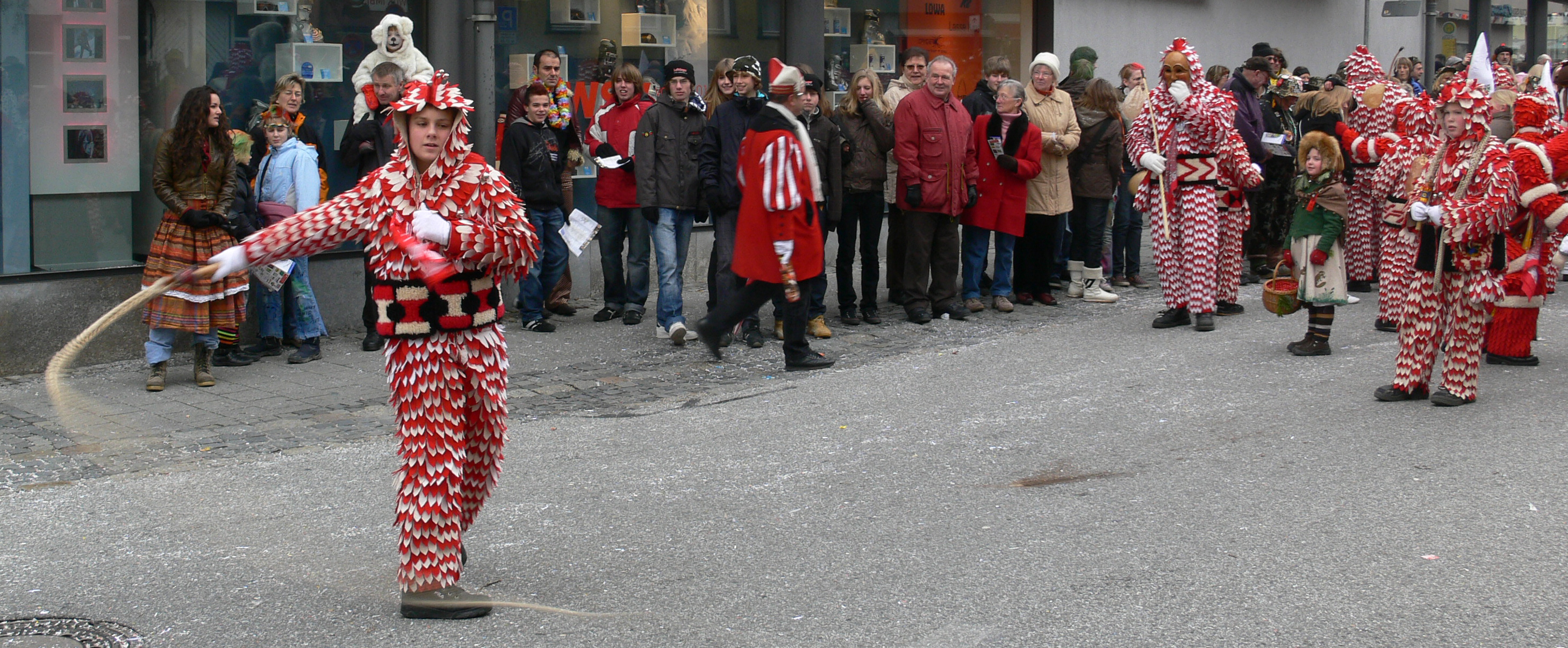 Narrensprung am Fasnetsmontag, 4. Februar 2008 in Ravensburg: Karbatschenschneller der Plätzlerzunft Weingarten